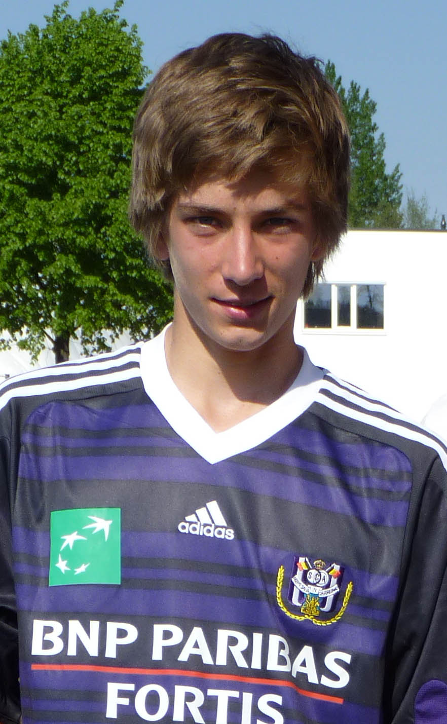 Belgisch voetbalspeler